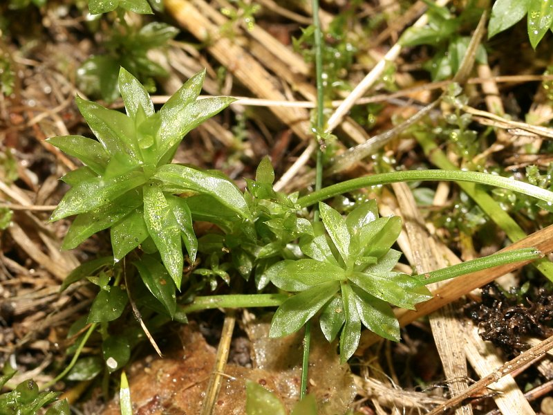 Rosenmoos (Rhodobryum roseum)